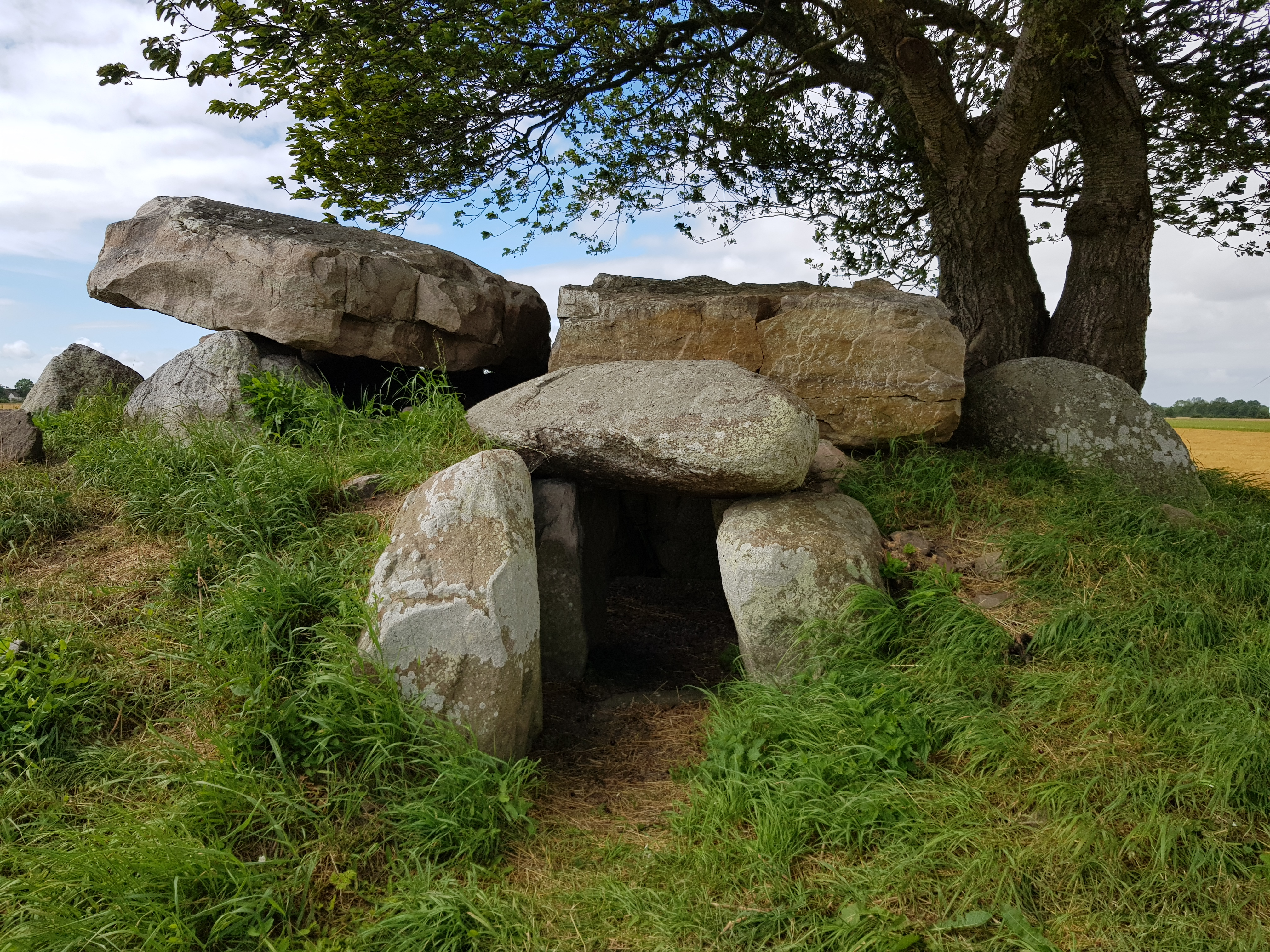 Bønnestenene (Jættestue), Grabanlage, am Stensebyvejen, Bornholm